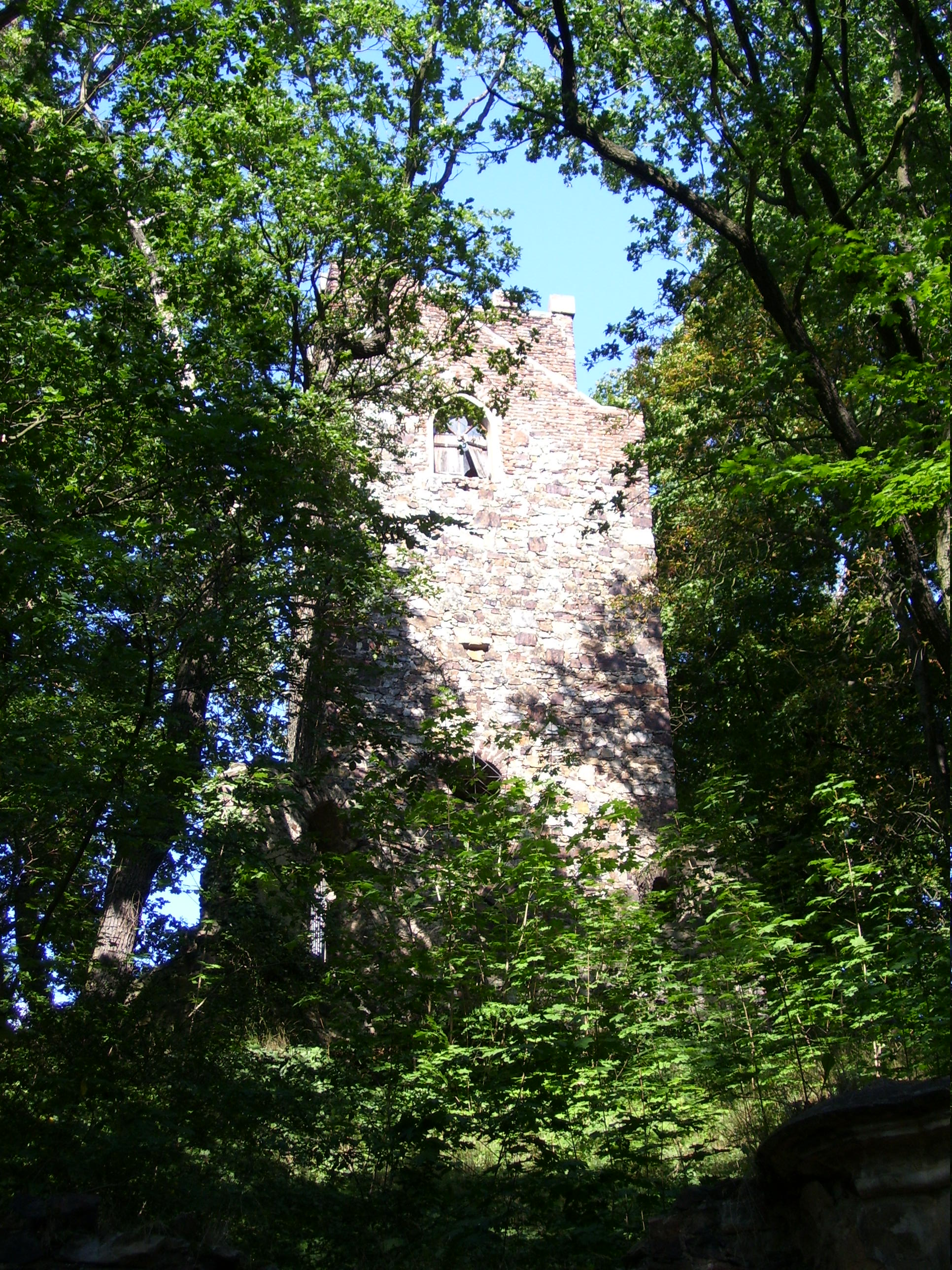 Park Cibulka (Praha), rozhledna